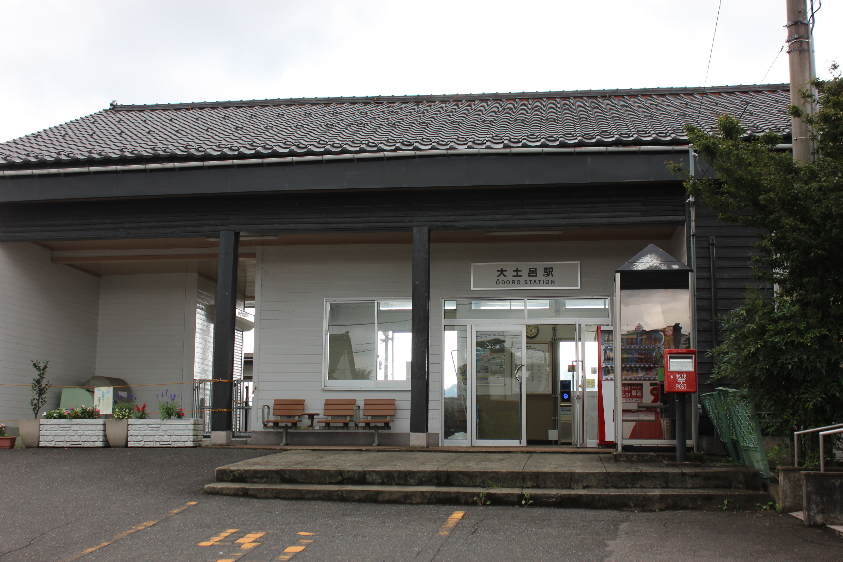 大土呂駅（福井県福井市）